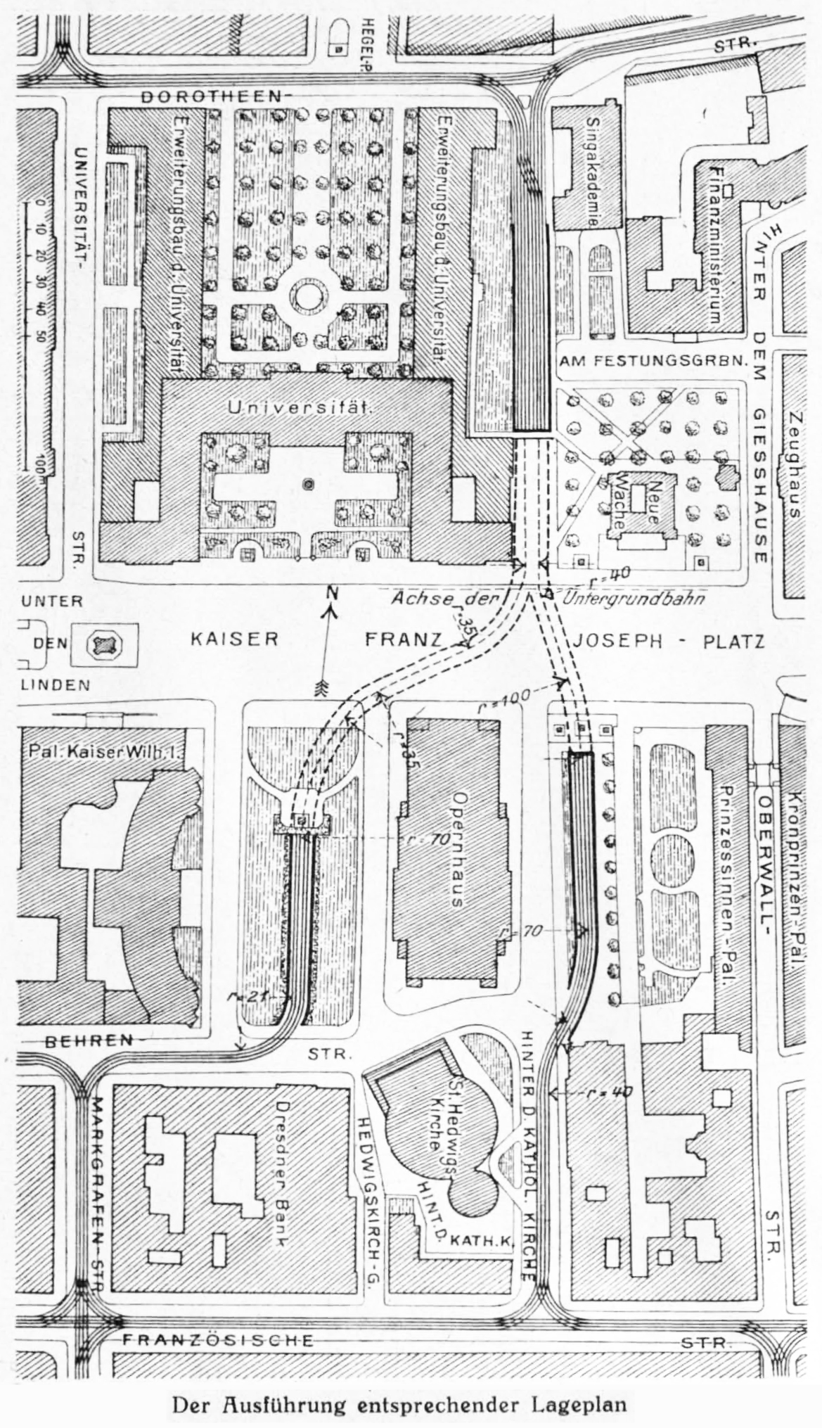 Ausführungsplan des Lindentunnels